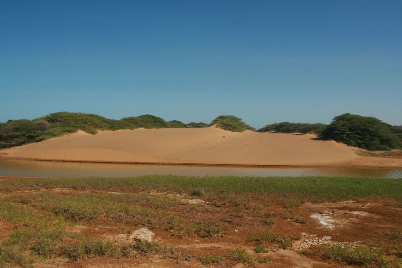 Casigua, estado Falcón. Vista de las dunas a orillas de la quebrada La Enramada.